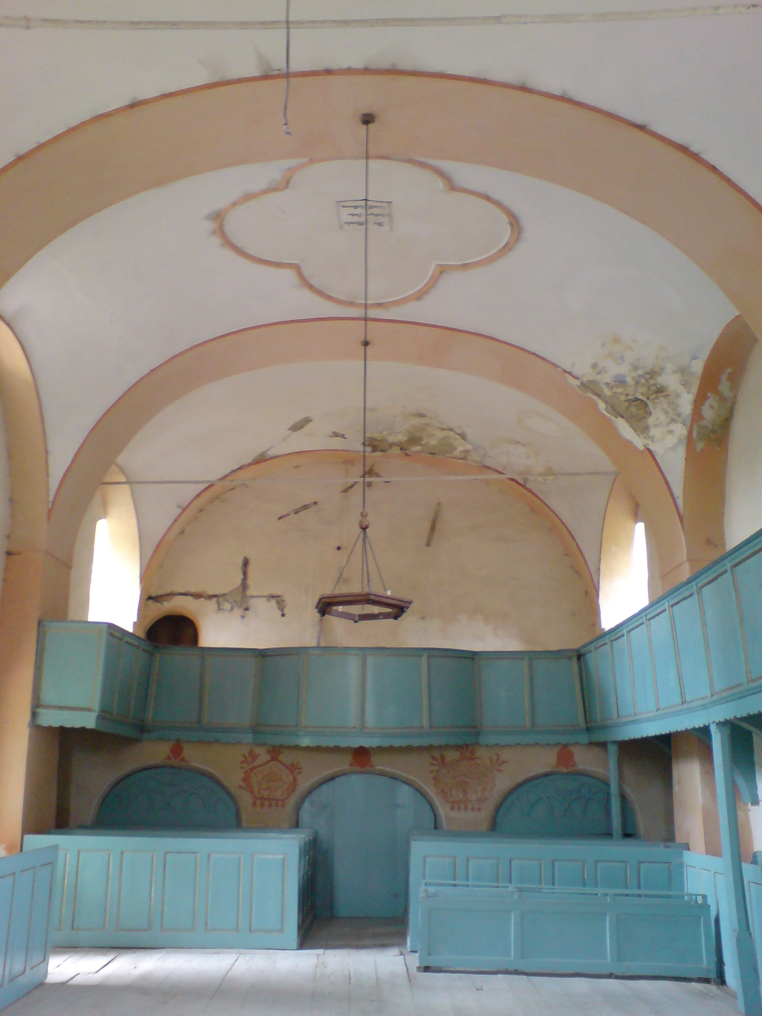 Kirchenburg Mardisch (Moardăş, Sibiu), Empore (2008)